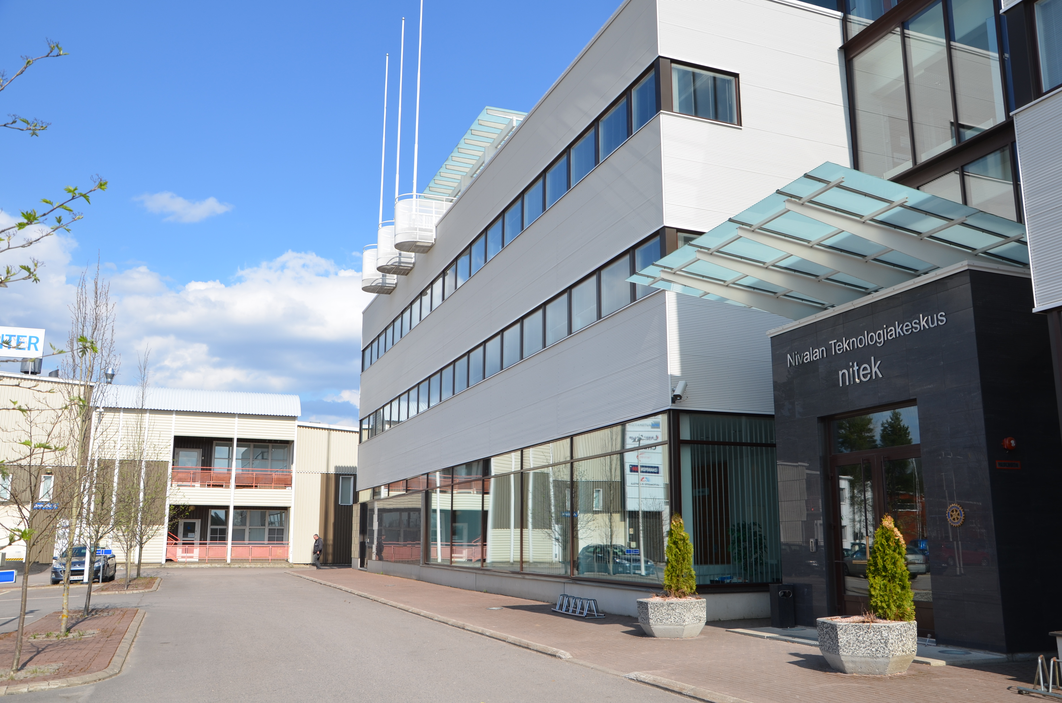 Nivalan teollisuuskylän rakennus, Oulun Eteläisen instituutin hallinnon toimipaikka